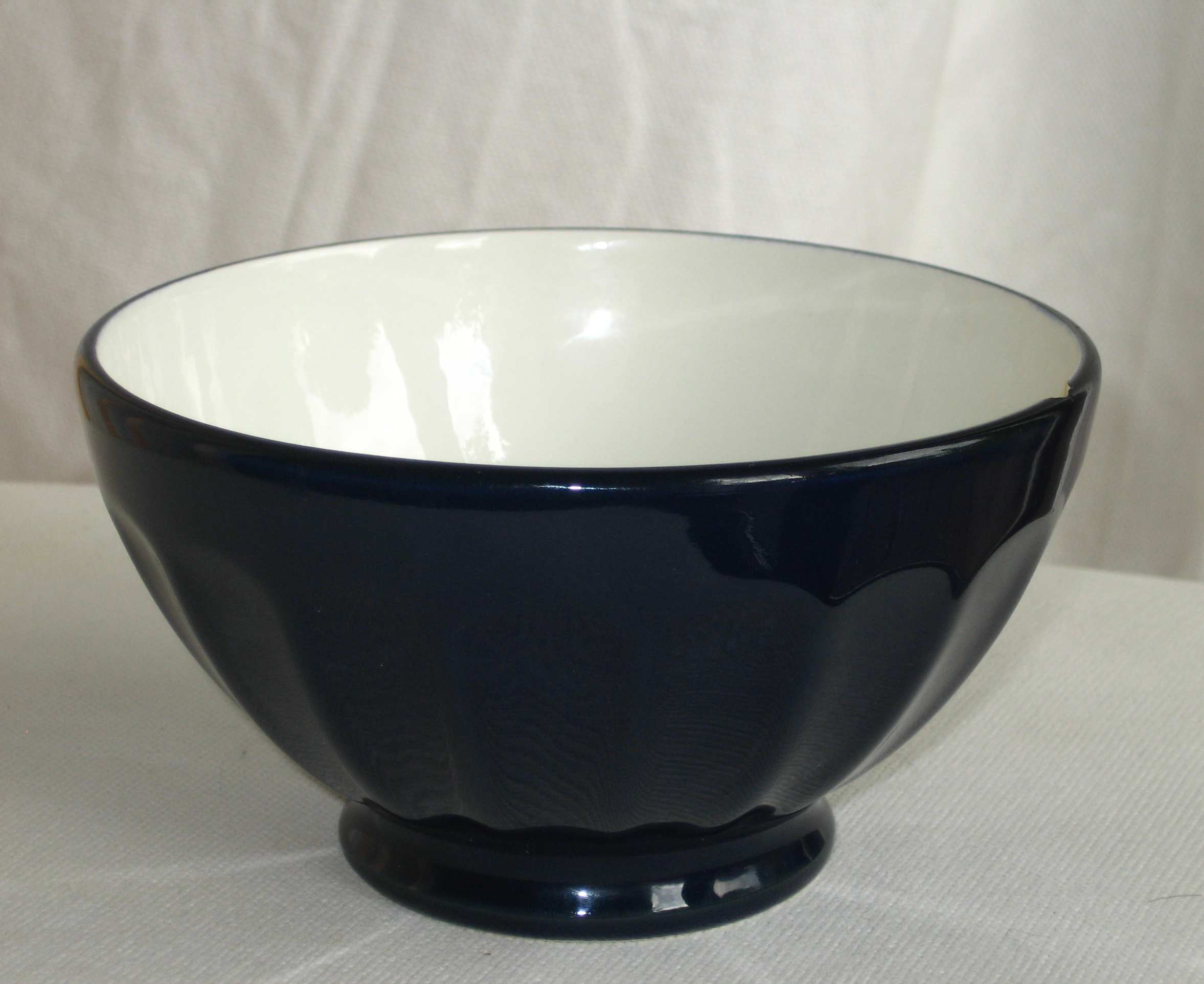 Eng Jatt, resp. e Boll.